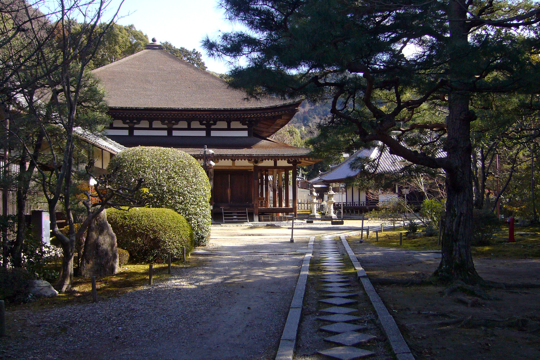 Hokaiji in Kyoto, Japan